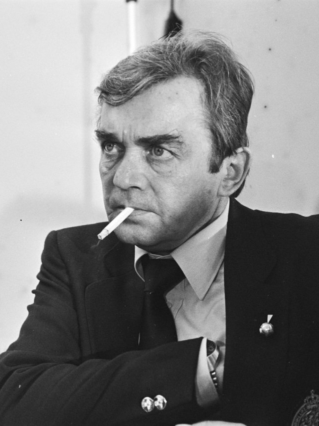 Vertrek Nederlands elftal van Schipol; Ernst Happel .